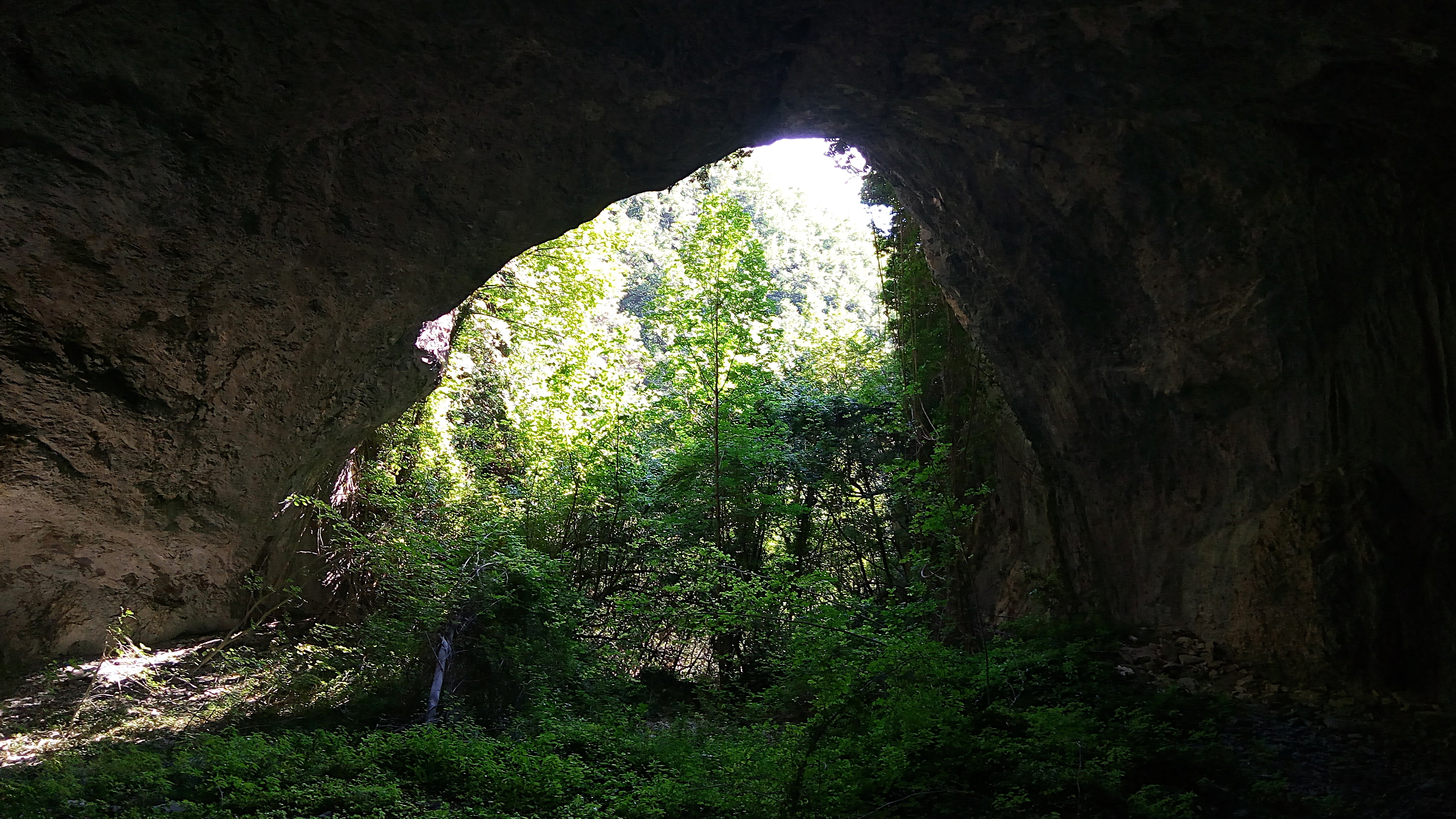 Antro del Monte Cucco noto con il nome di Grotta di San Donino